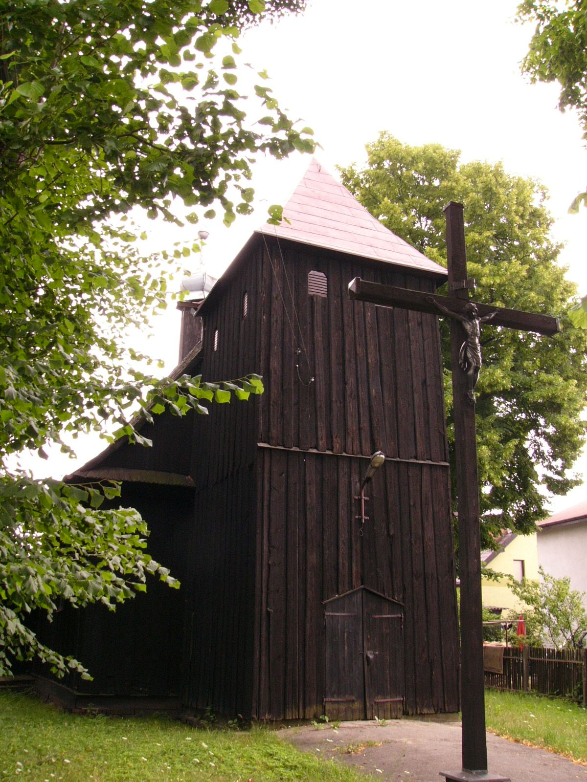 Ostrzeszów, ul. św. Mikołaja - drewniany kościół filialny pw. św. Mikołaja z 1758 r. (zabytek nr 707/Wlkp/A)